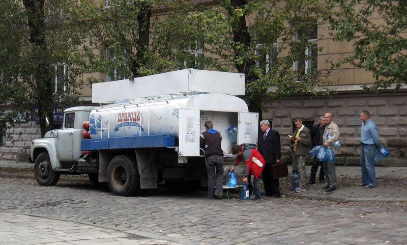 Selling drinkable water in Lviv, Ukraine